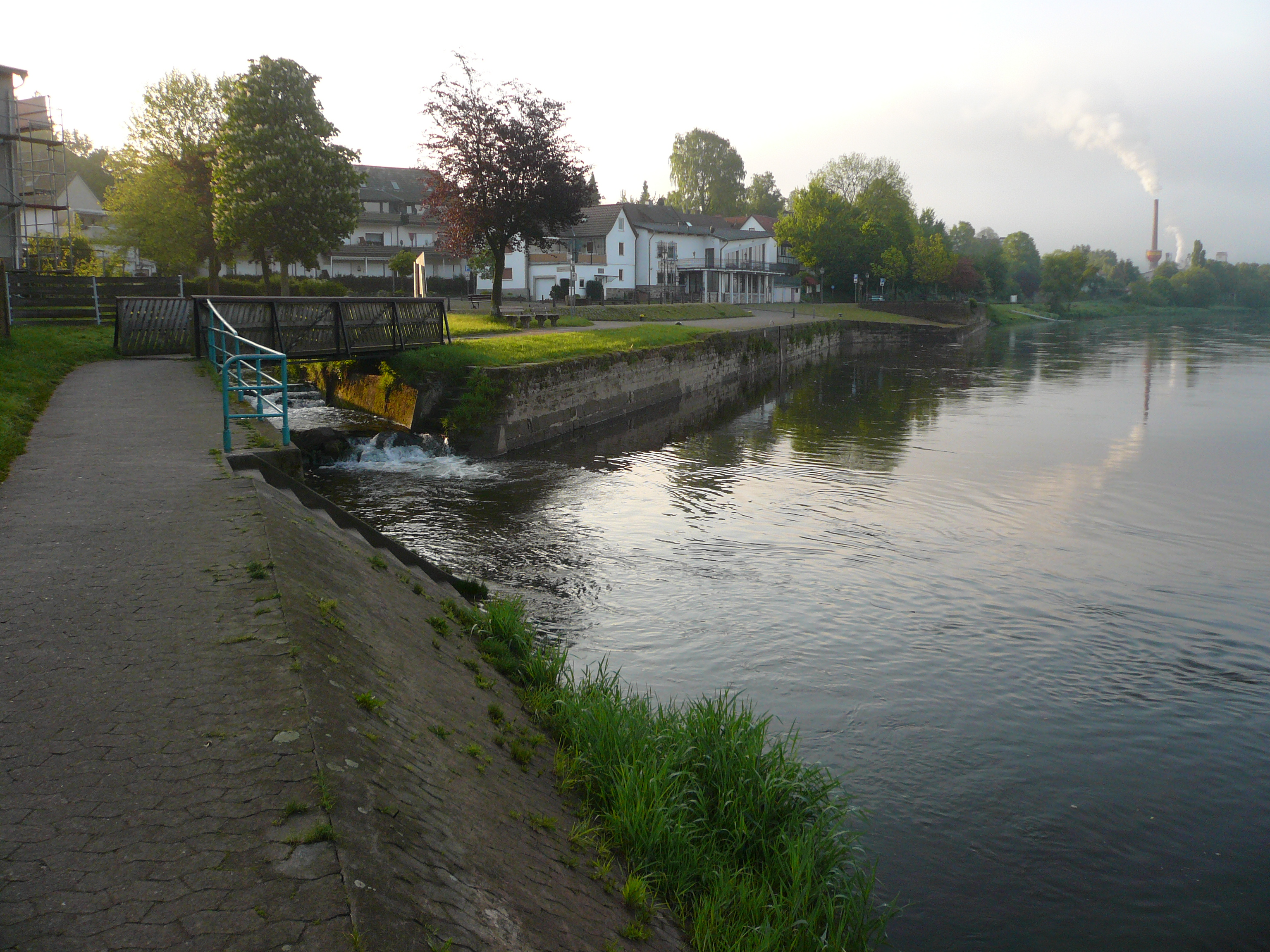 Mündung des Reiherbachs in die Weser bei Bodenfelde mit Brücke des Weserradwegs. In Bildmitte alte Hafenanlagen von Bodenfelde, im Hintergrund rechts das Holzkohlewerk proFagus.